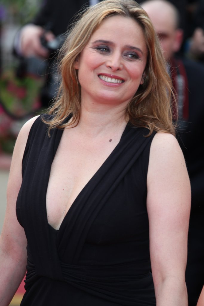 Carole Franck lors de l'ouverture du Festival de Cannes 2010 le 12 mai 2010